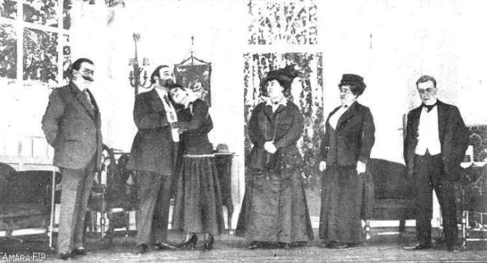 Escena del estreno de la obra de teatro Fantasmas, de Manuel Linares Rivas